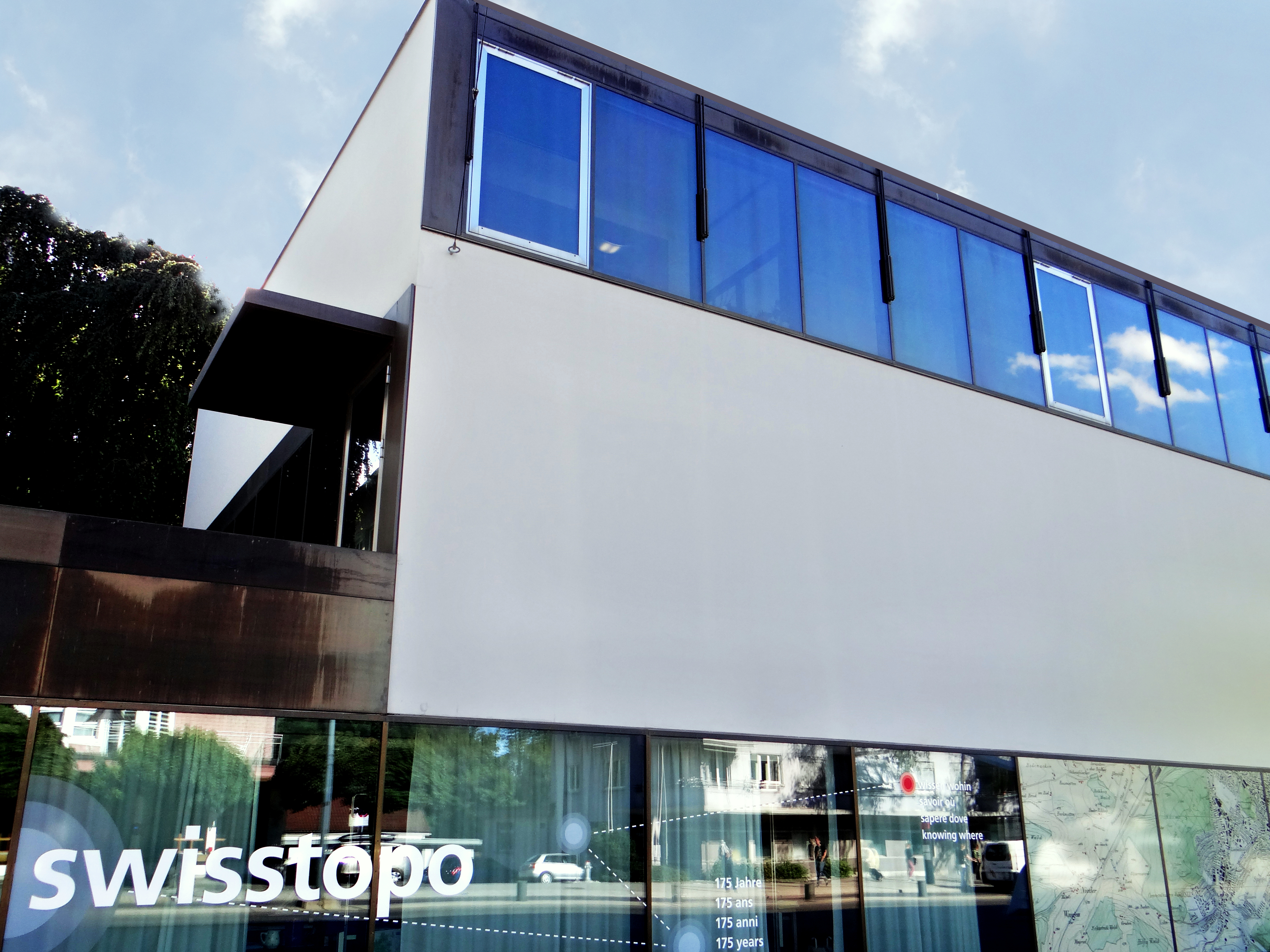 Archiv des Bundesamtes für Landestopographie (swisstopo)